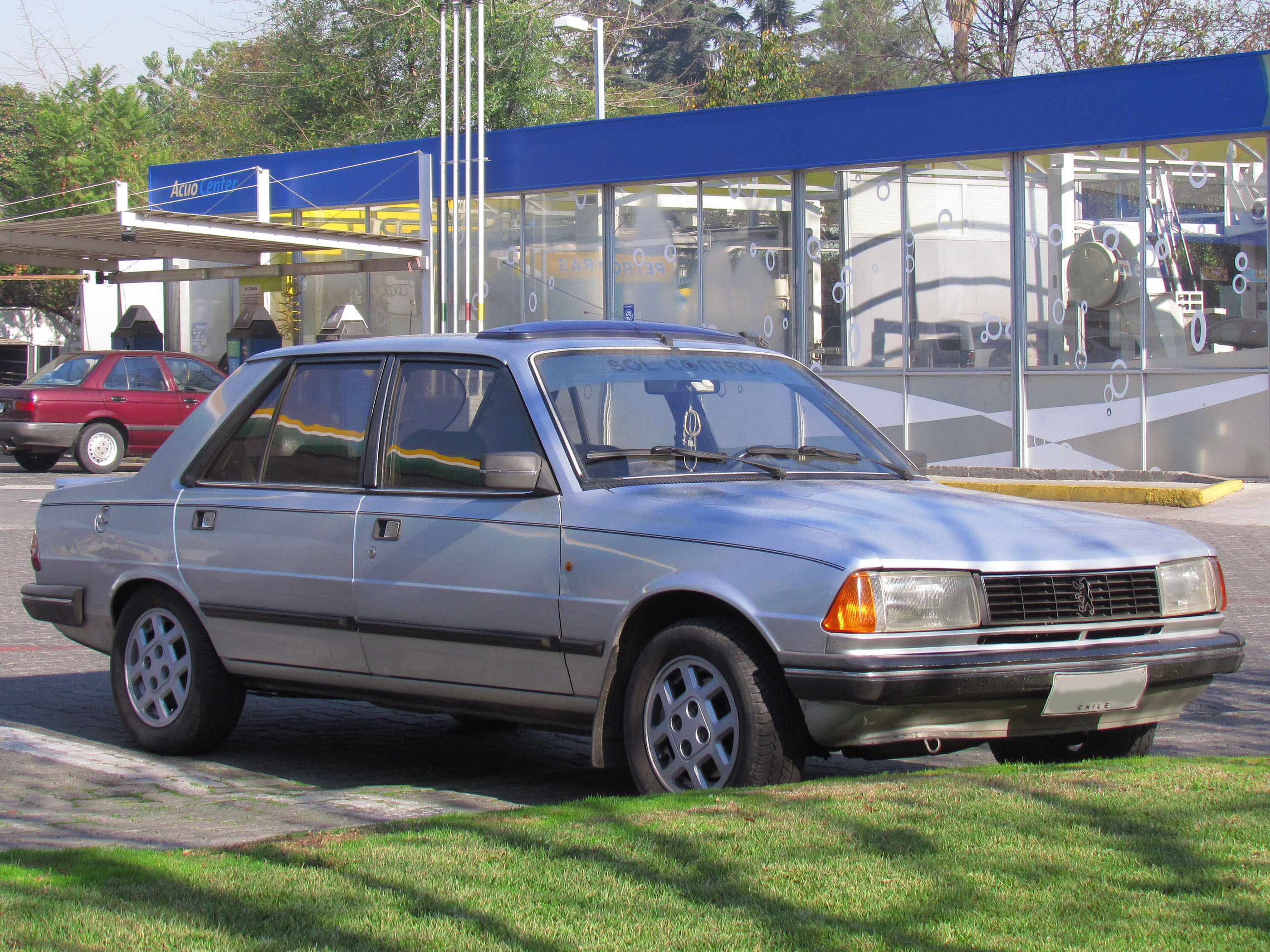 Peugeot 305 1.6 GTX 1988